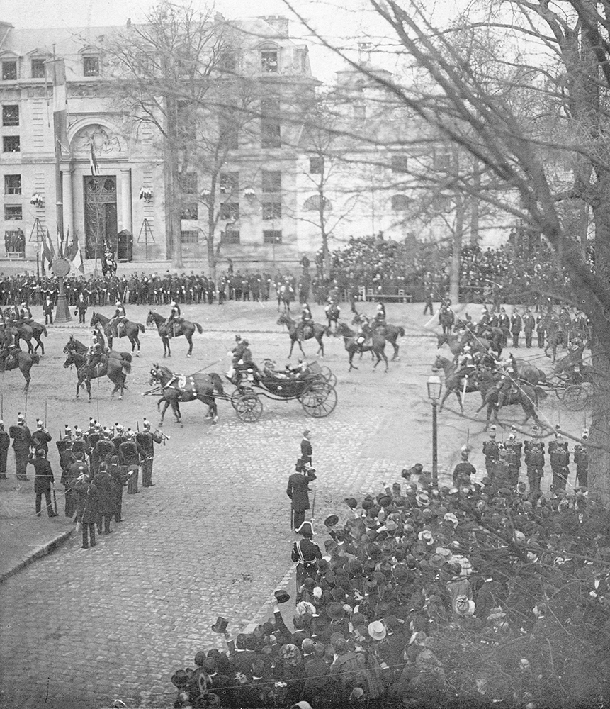 Arrivée de Sadi Carnot au centenaire des Etats généraux le 5 mai 1889 à Versailles. Passage devant le Quartier de Noailles (anciennes écuries de Madame du Barry), 19 Avenue de Paris, Versailles.